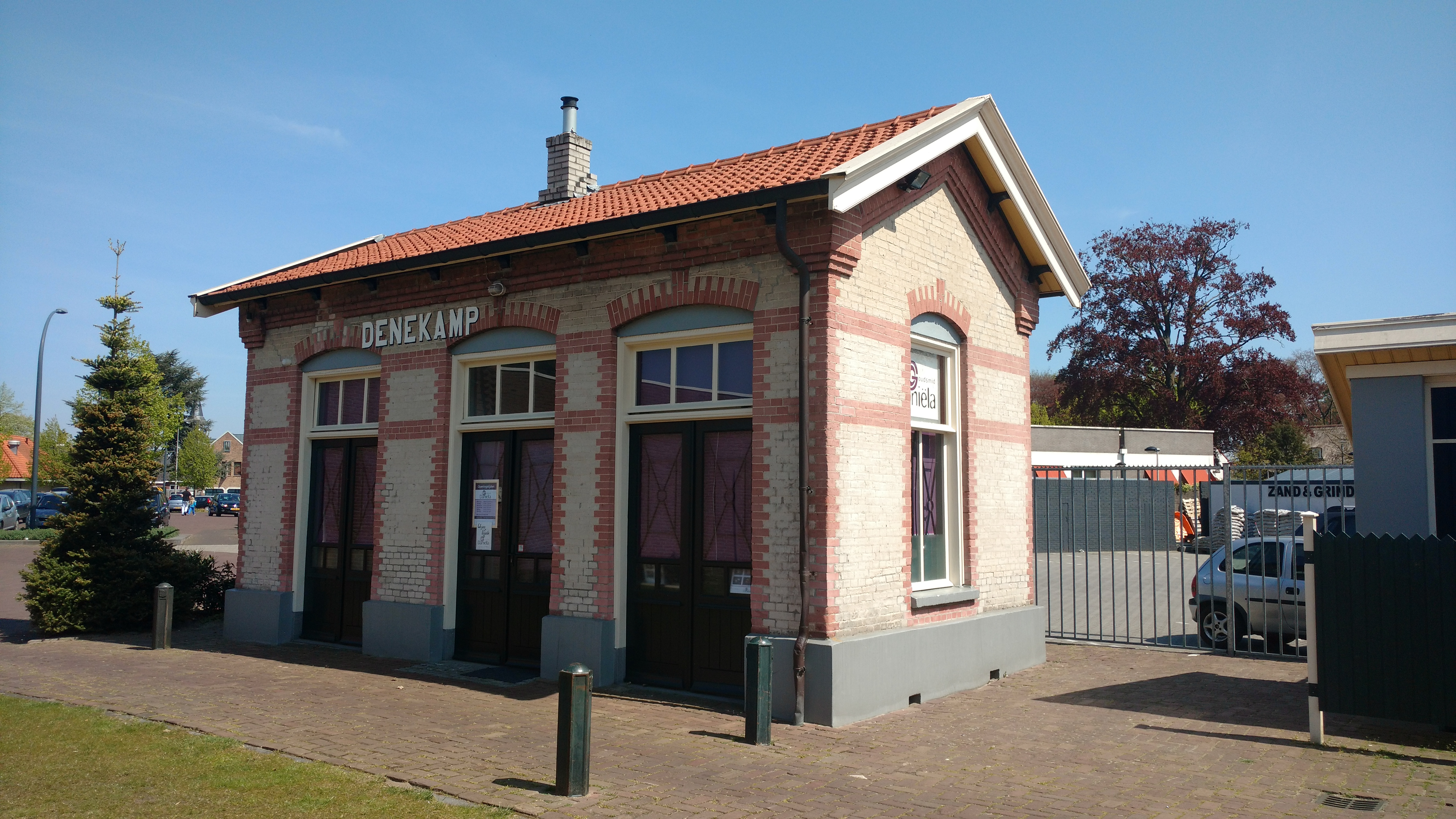 Voormalig tramstationnetje uit 1903 van de Nederlandsch-Westfaalse Stoomtramweg